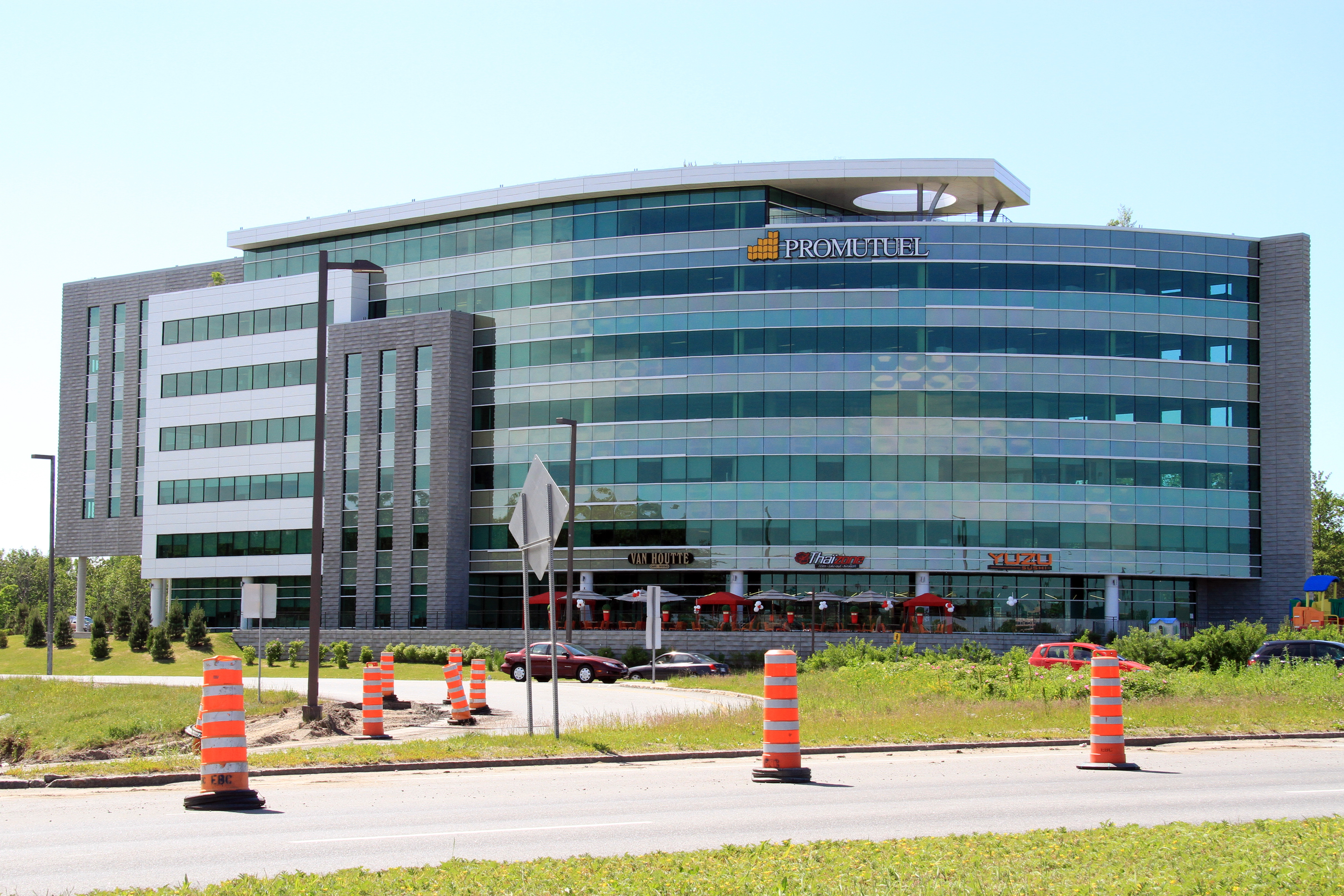 L'édifice Promutuel, au 2000 boulevard Lebourgneuf, dans l'arrondissement des Rivières de la ville de Québec. L'édifice du promoteur Immostar a obtenu une certification LEED-Or pour son toit végétal et son système géothermique.